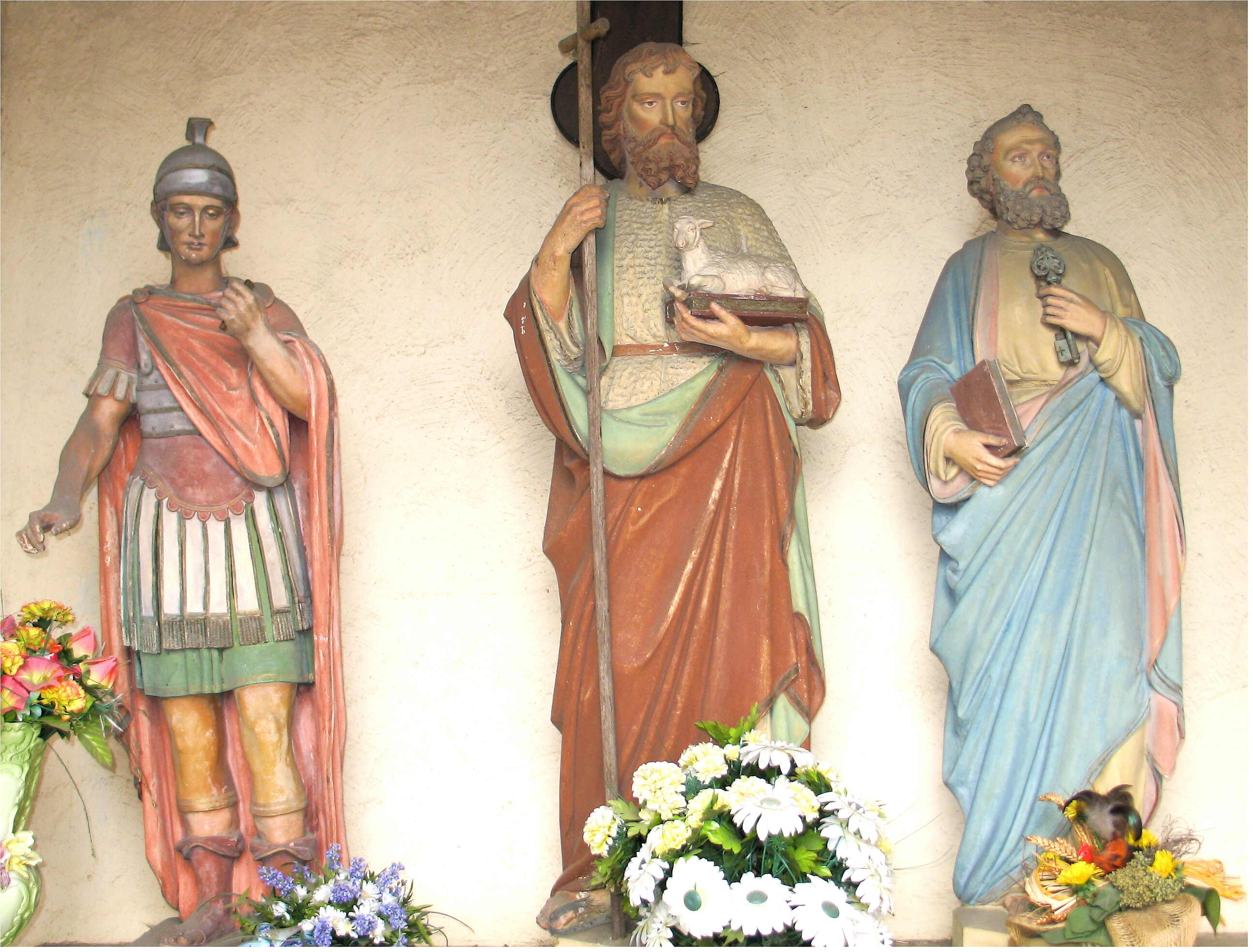 Statuen an enger Weekapell zu Aassel, den ??, Jang den Deefer, Apostel Péitrus. Source : Eege Foto vum Johnny Chicago Lizenz